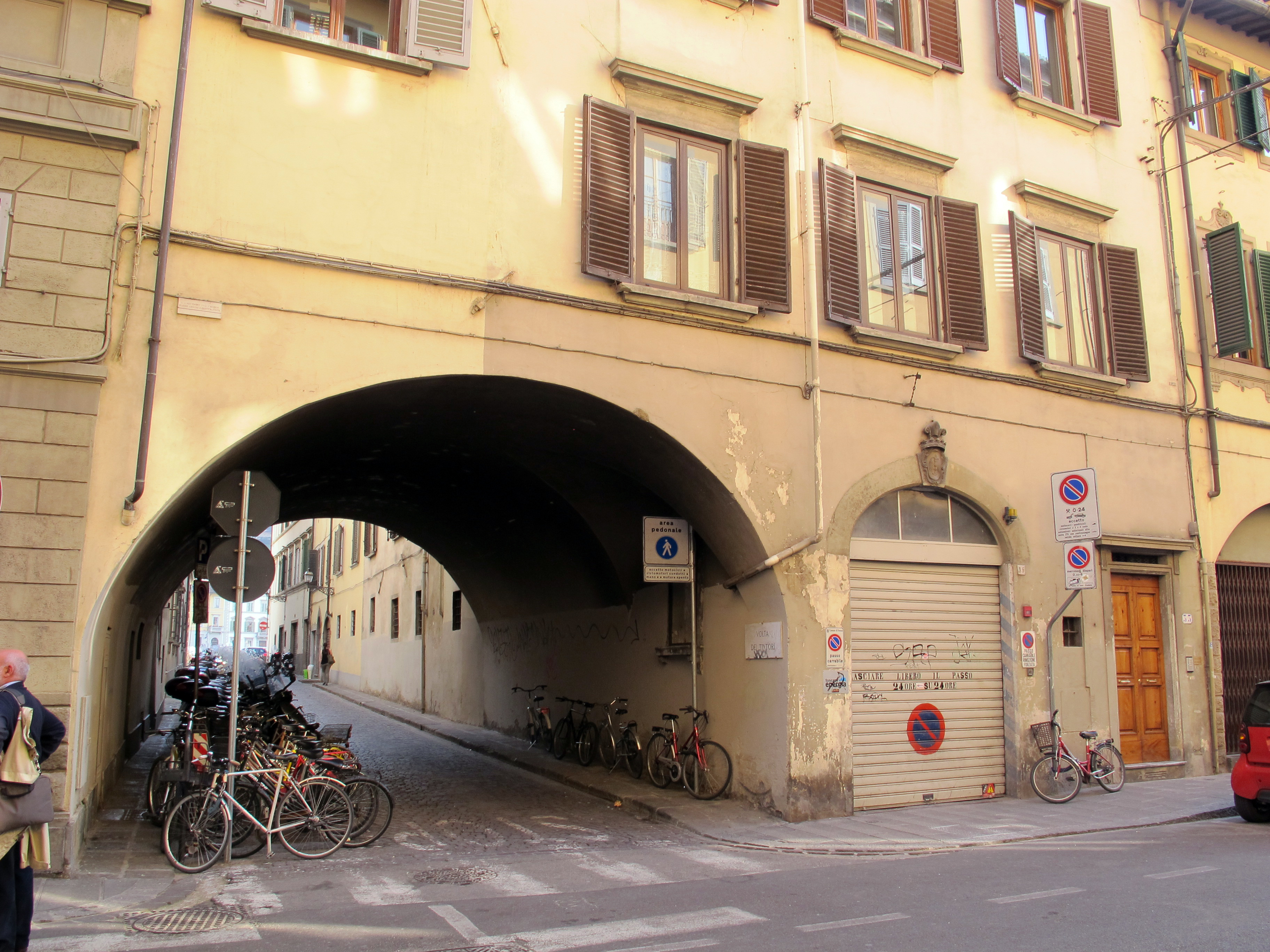 Corso tintori 33, casa dell'eremo di camaldoli con volta tintori